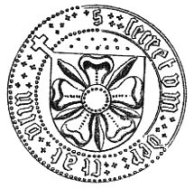 Viljandi sekreetpitsati (väike pitsat) jäljend alates aastast 1432